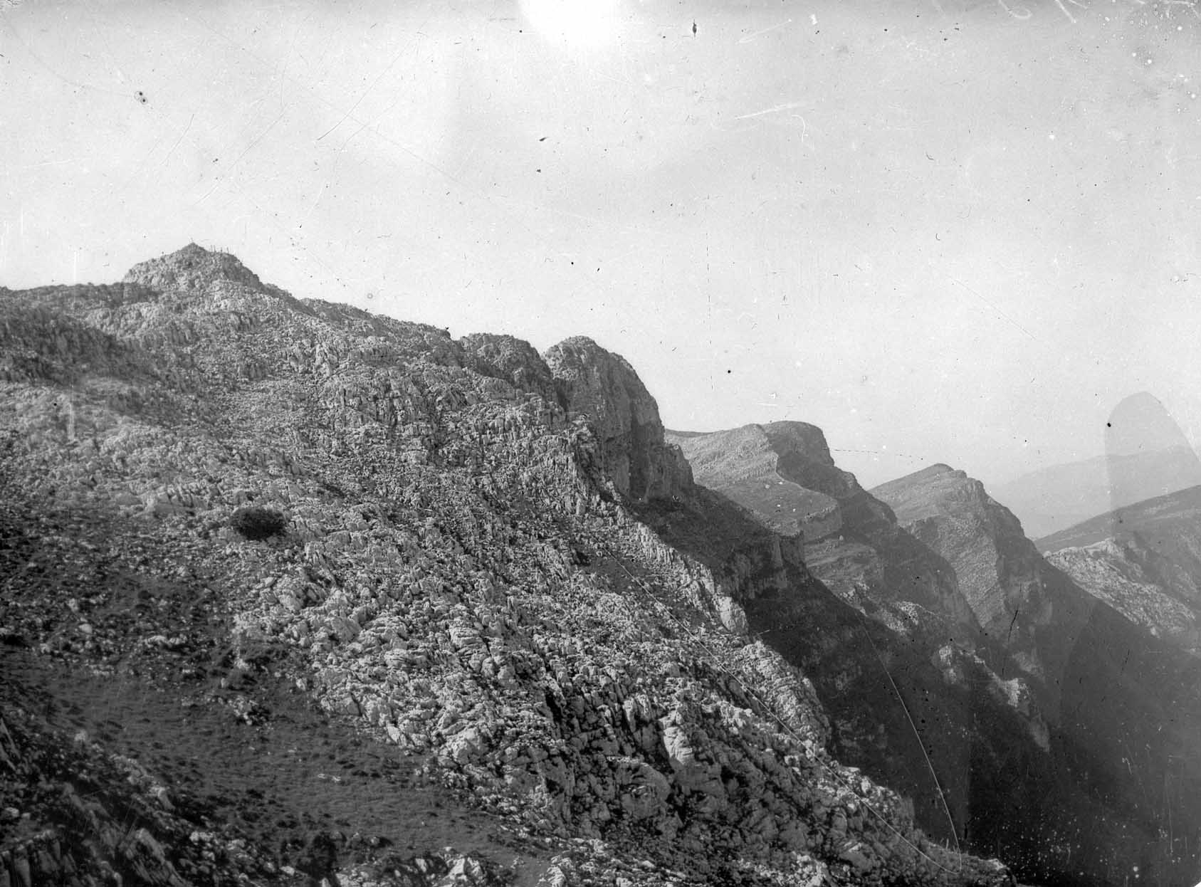 Intzako Dorrea (Soilazbizkargaina), Aldaon eta Beoin